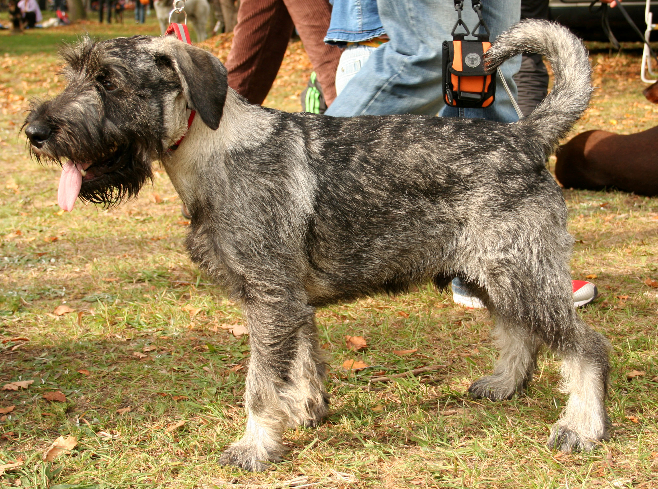 Sznaucer średni o umaszczeniu pieprz i sól podczas krajowej wystawy w Rybniku - Kamieniu.